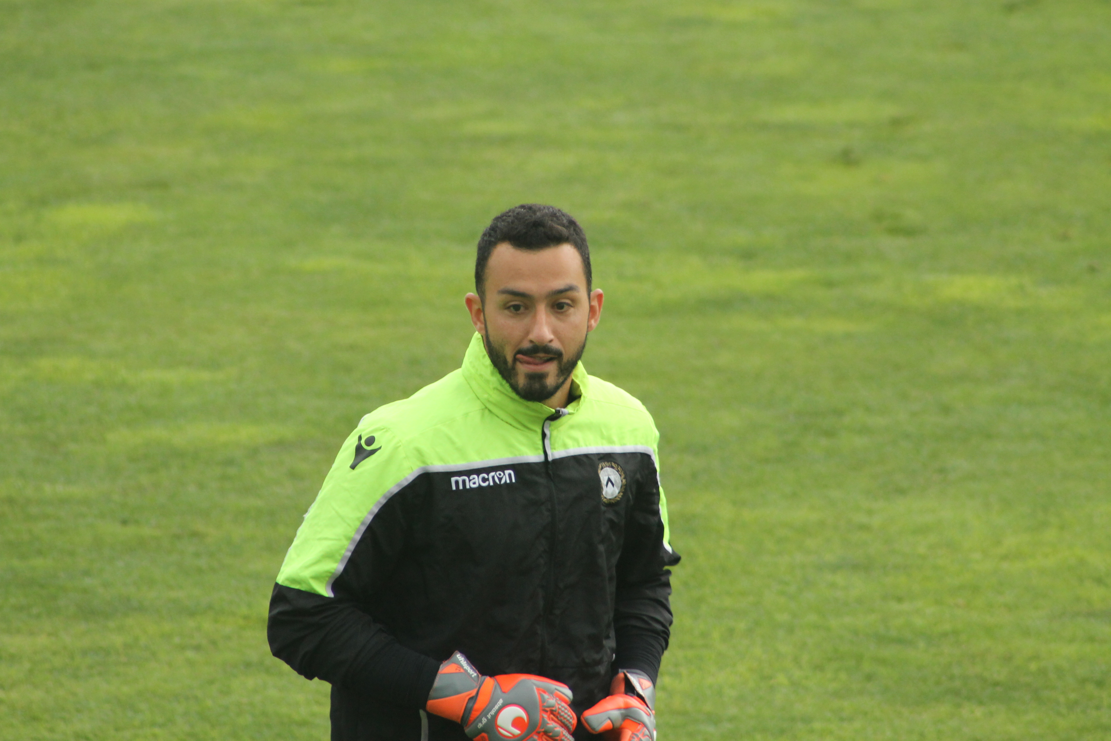 Nicolas Andrade durante un allenamento nel ritiro di St. Veit con l'Udinese.